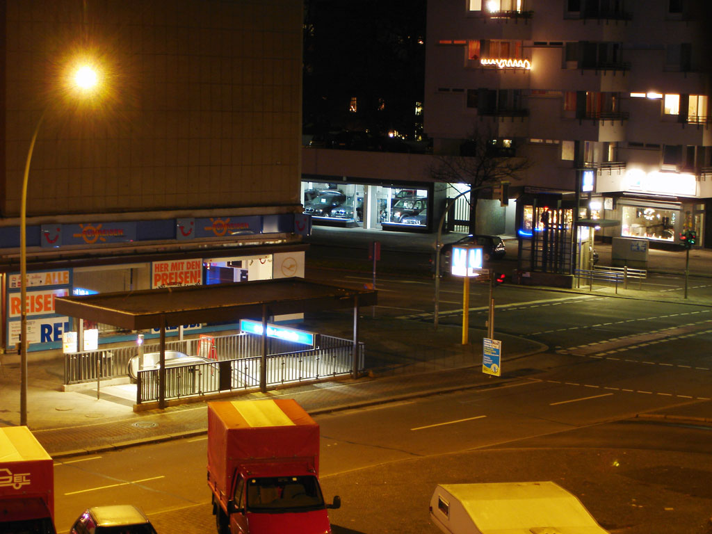 Ausgang des U-Bahnhofs Berliner Straße